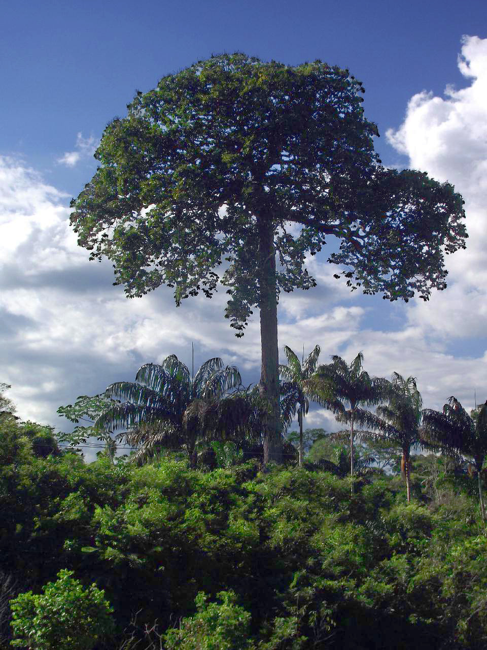 Castanheira fotografada próxima a cidade de Marabá, estado do Pará, Brasil.